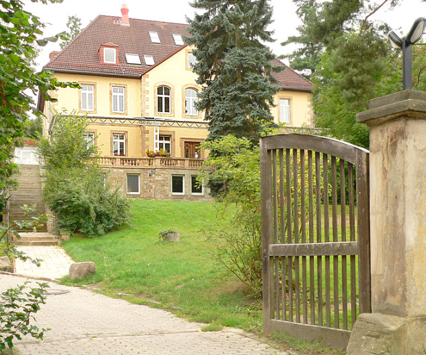 Amtshaus unterhalb der Burg Wohldenberg. Foto aufgenommen von Benutzer Benutzer:AxelHH, August 2006.